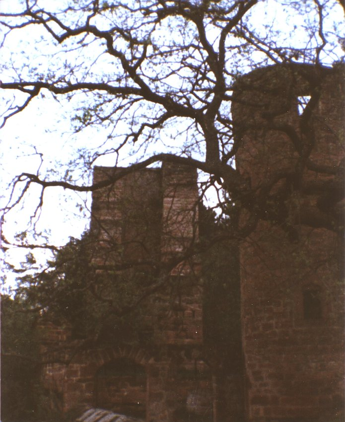 Burg Diemerstein